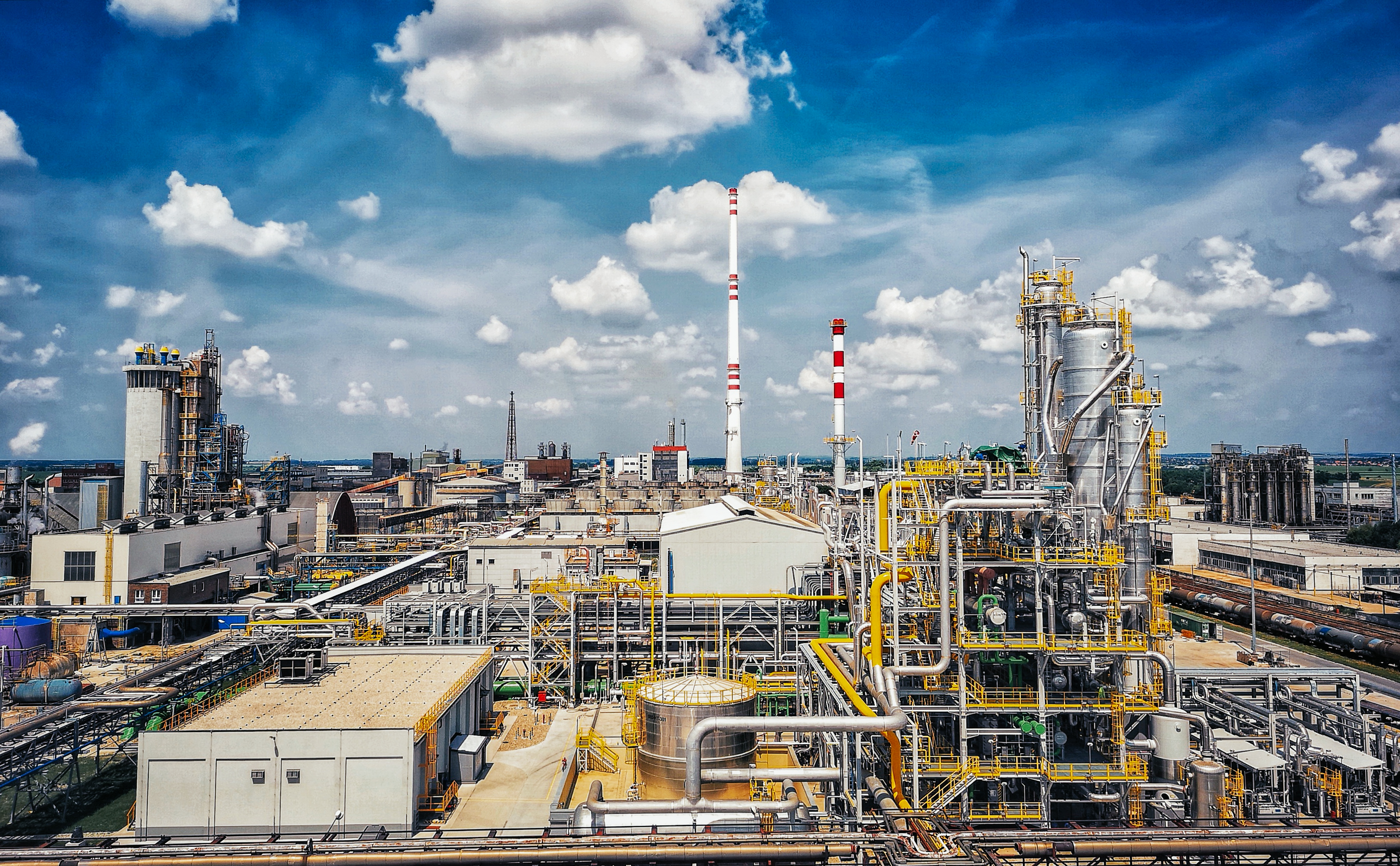 Duslo, a.s.